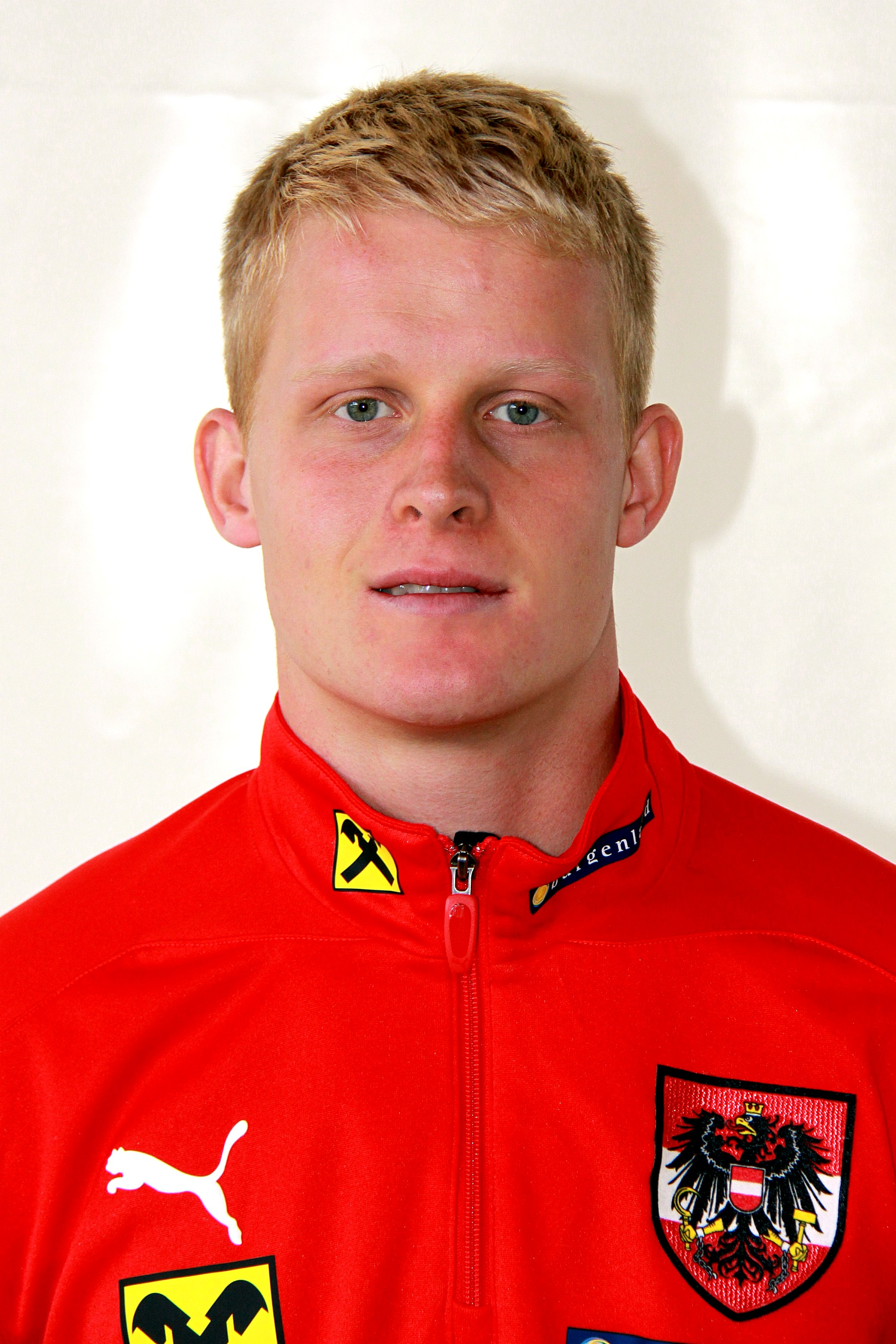 Thomas Hopfer (TSV Hartberg) - Österreichische Fußballnationalmannschaft (U-21-Männer)